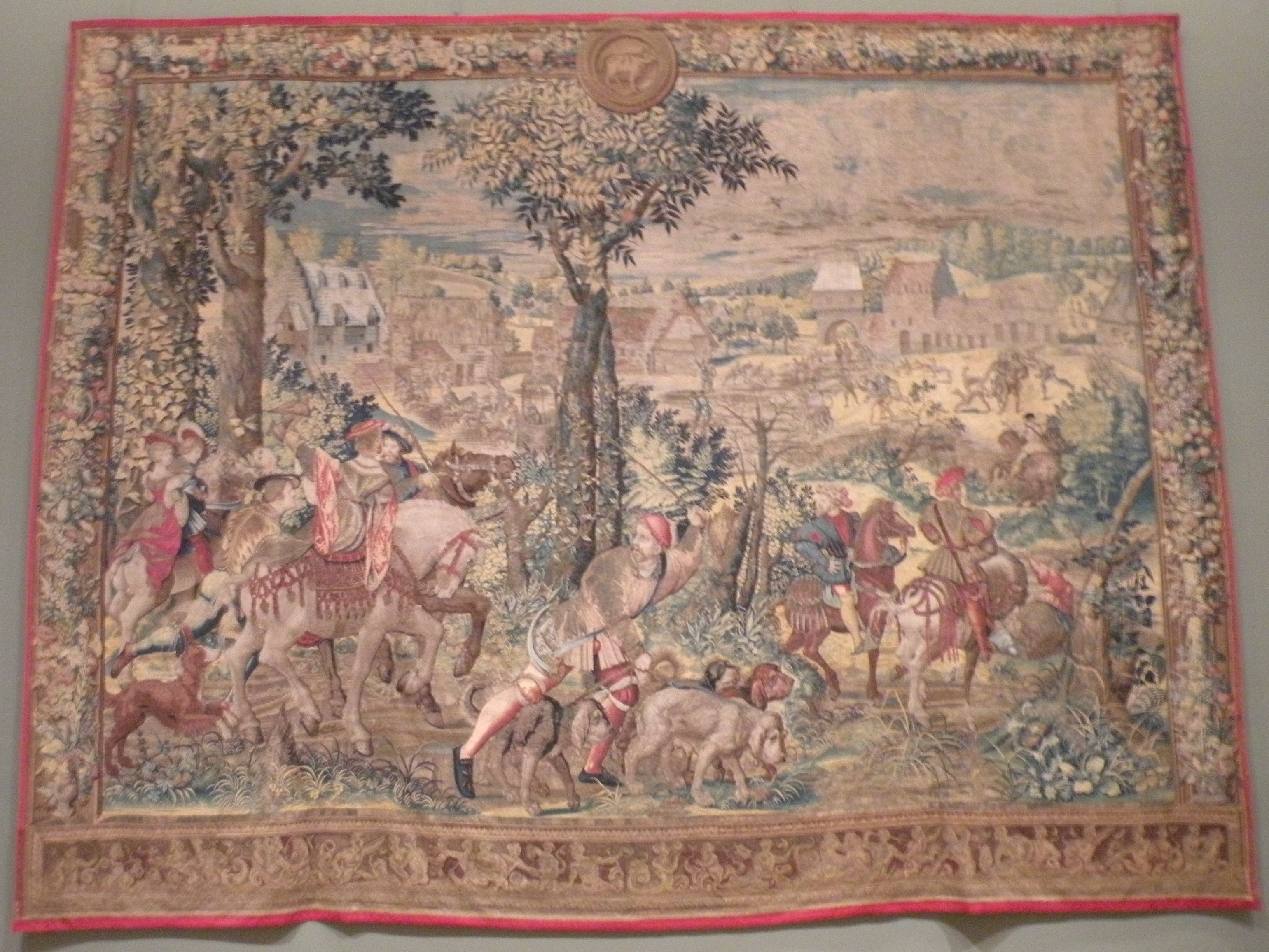 Le Mois d'Avril (signe du Taureau) Deuxième pièce de la tenture Les Chasses de Maximilien 1531 - 1533 Bruxelles Tapisserie, laine, soie, or et argent H. : 4,53 m. ; L. : 5,85 m.